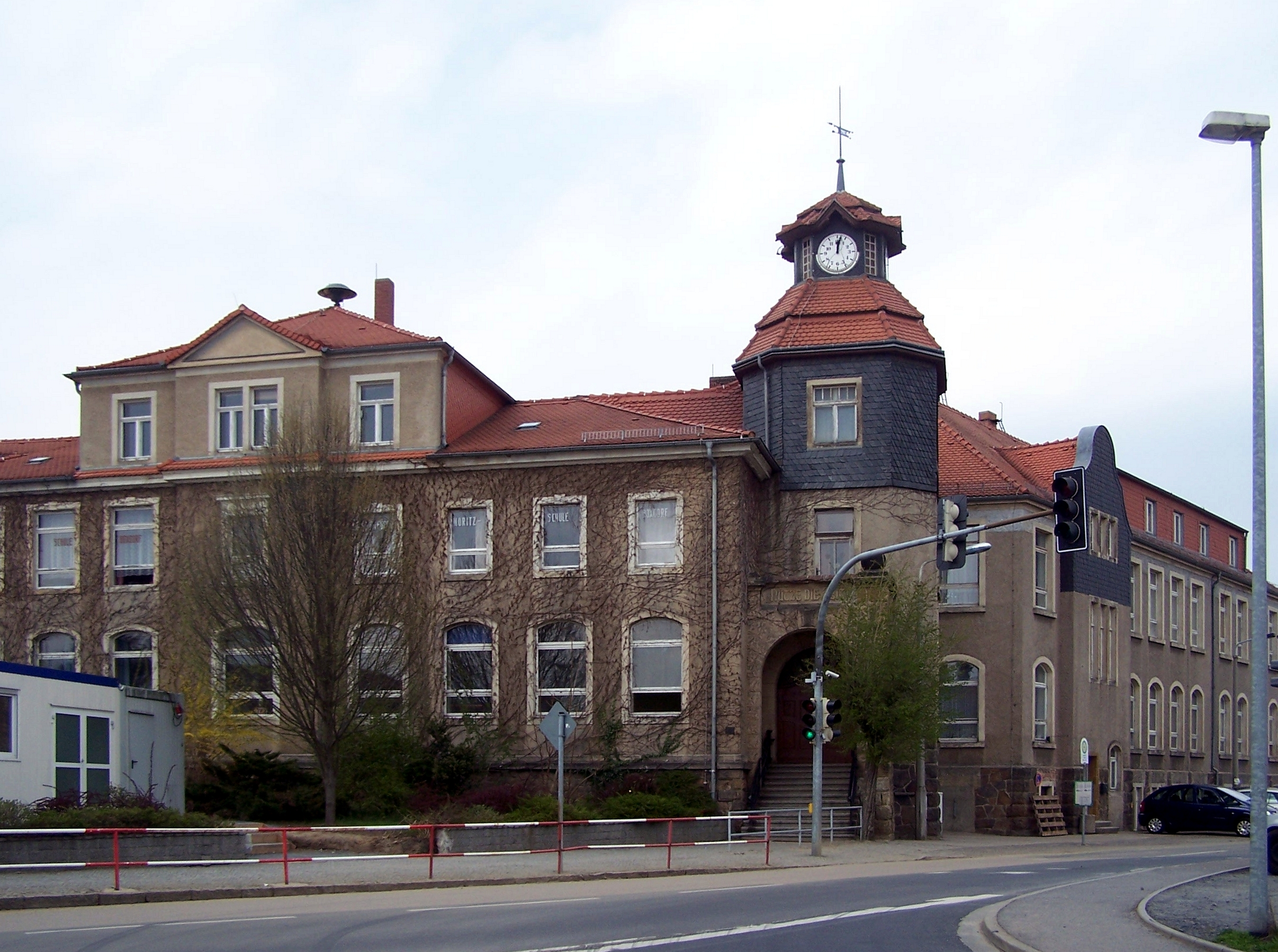 Kurfürst-Moritz-Schule Boxdorf , Gemeinde Moritzburg, Landkreis Meißen